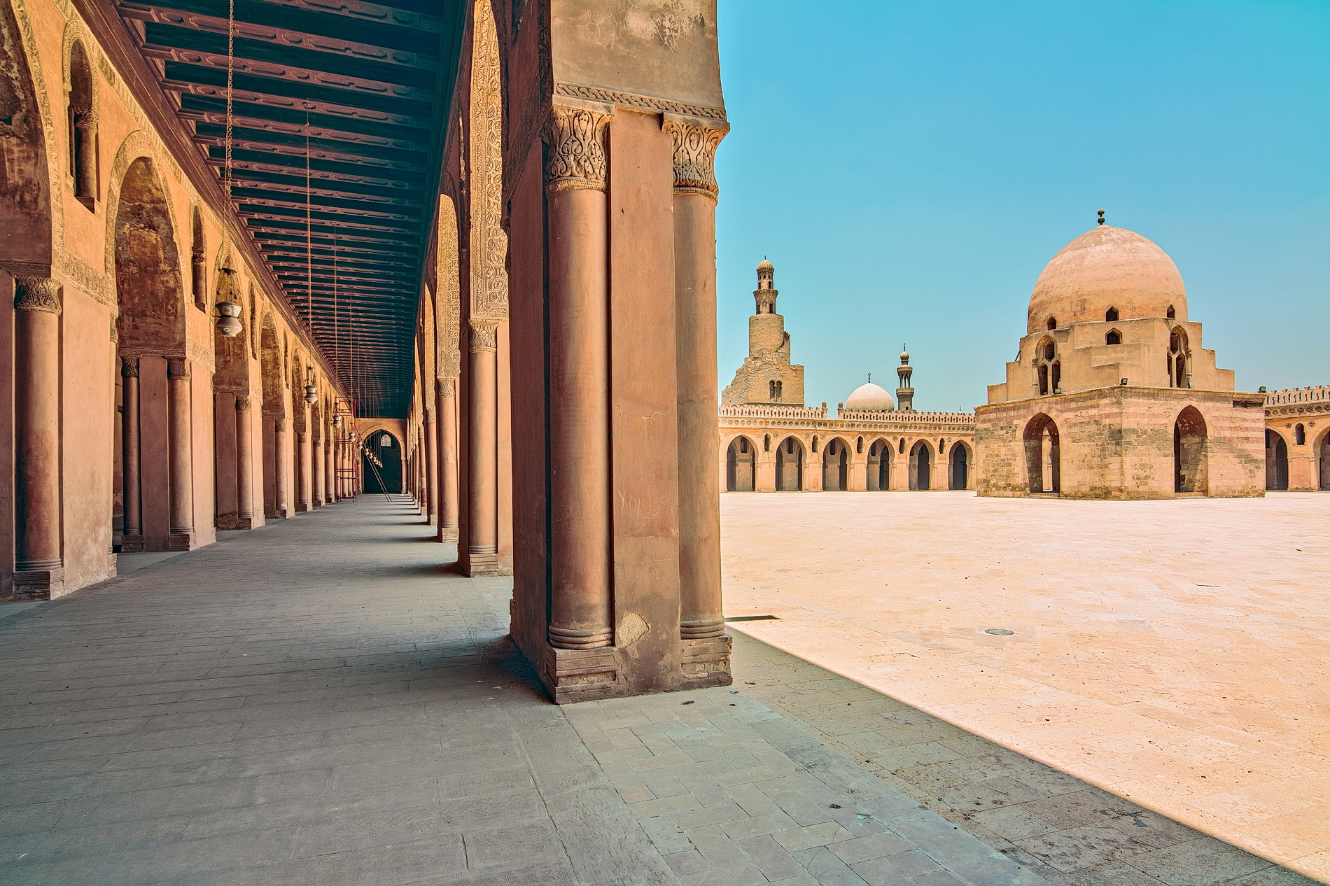 من داخل مسجد احمد بن طولون و هو من اقدم المساجد فى مصر